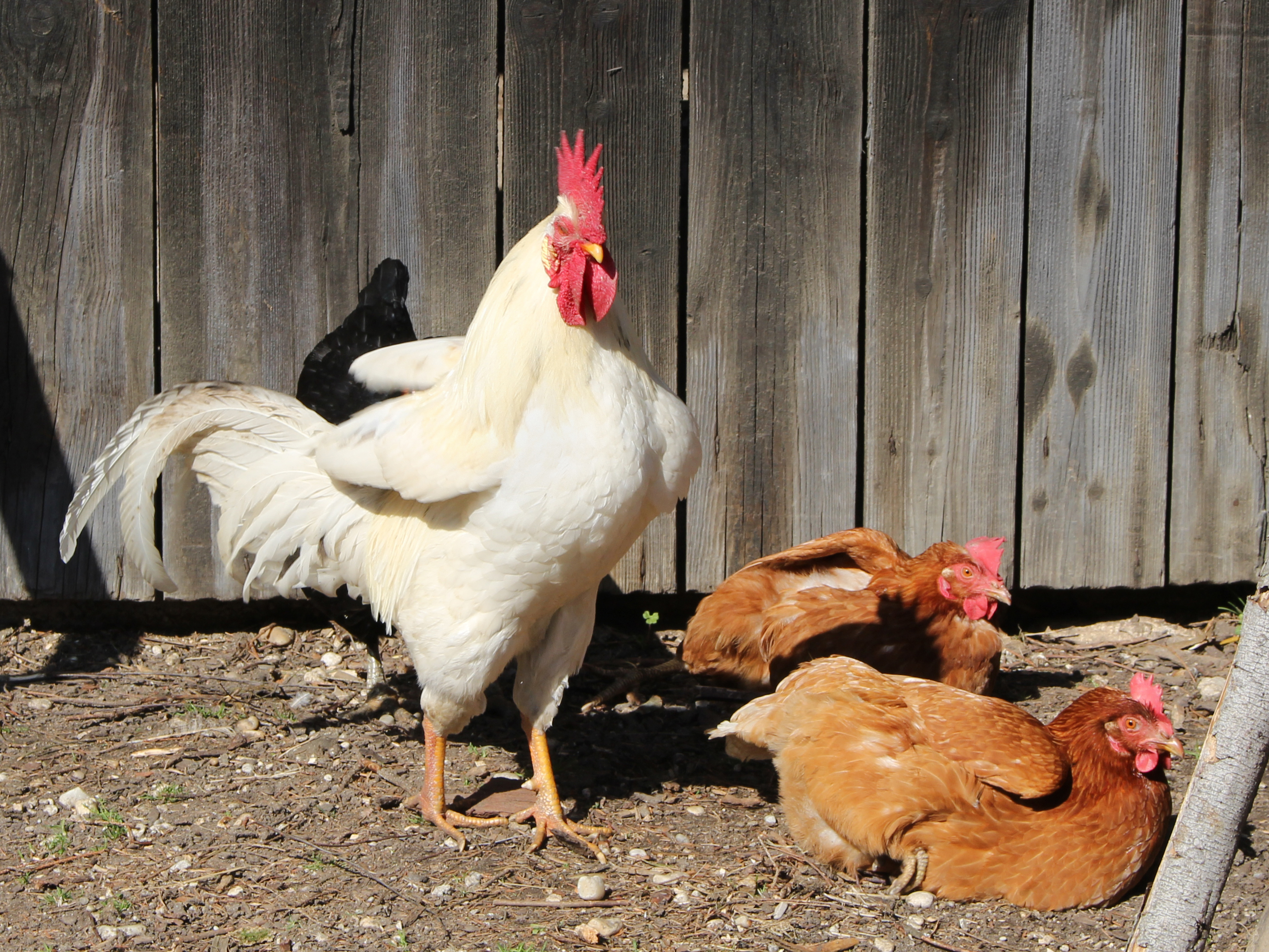 Weißer Hahn mit Hennen in Ardagger